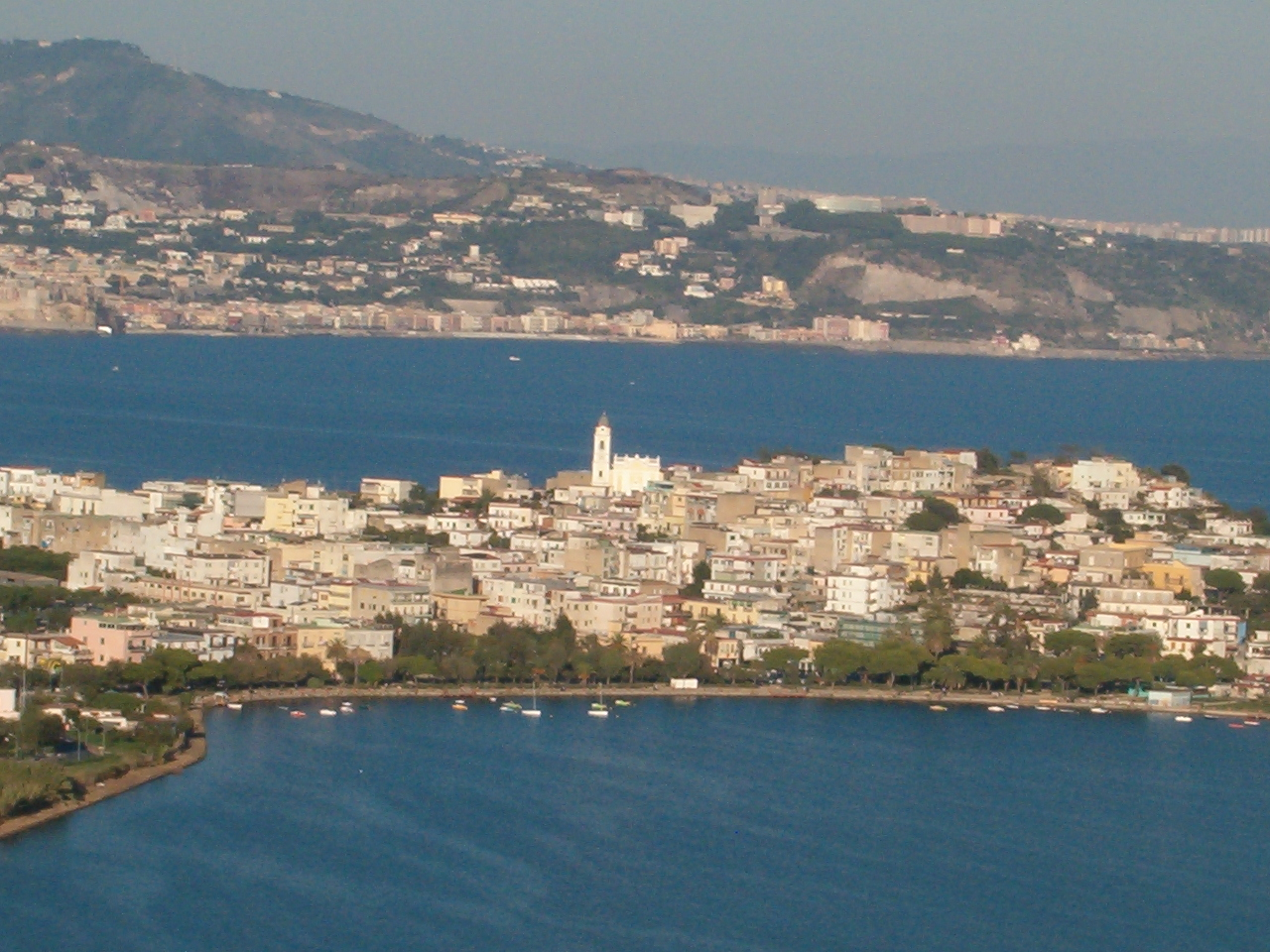 Bacoli - Veduta ravvicinata presa da Monte di Procida - Spicca la Chiesa di Sant'Anna. Sullo sfondo, Pozzuoli (via Napoli) e alle sue spalle il vulcano della Solfatara.